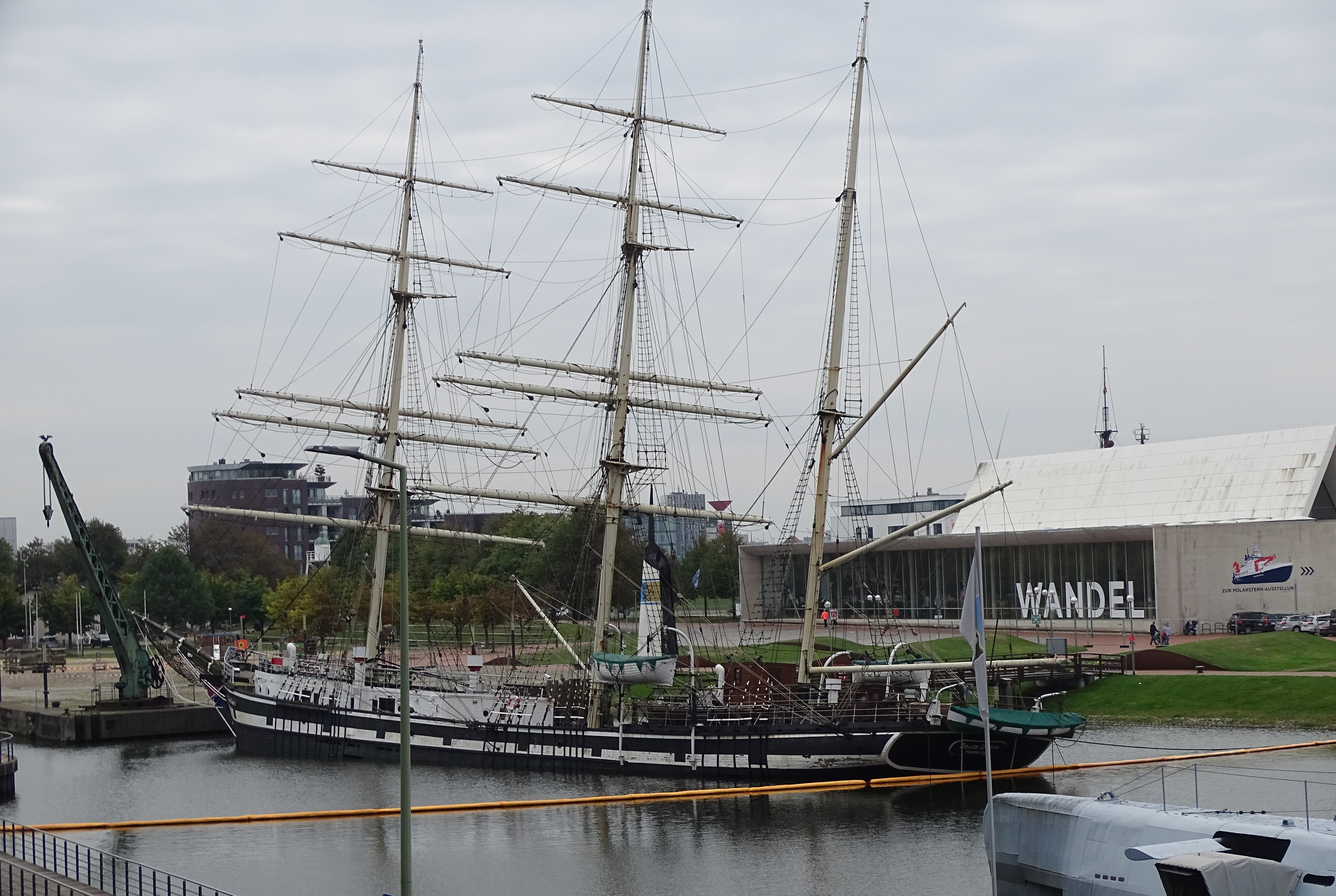 Durch Brand leckgeschlagene und auf Grund gesackte Seute Deern im Alten Hafen von Bremerhaven